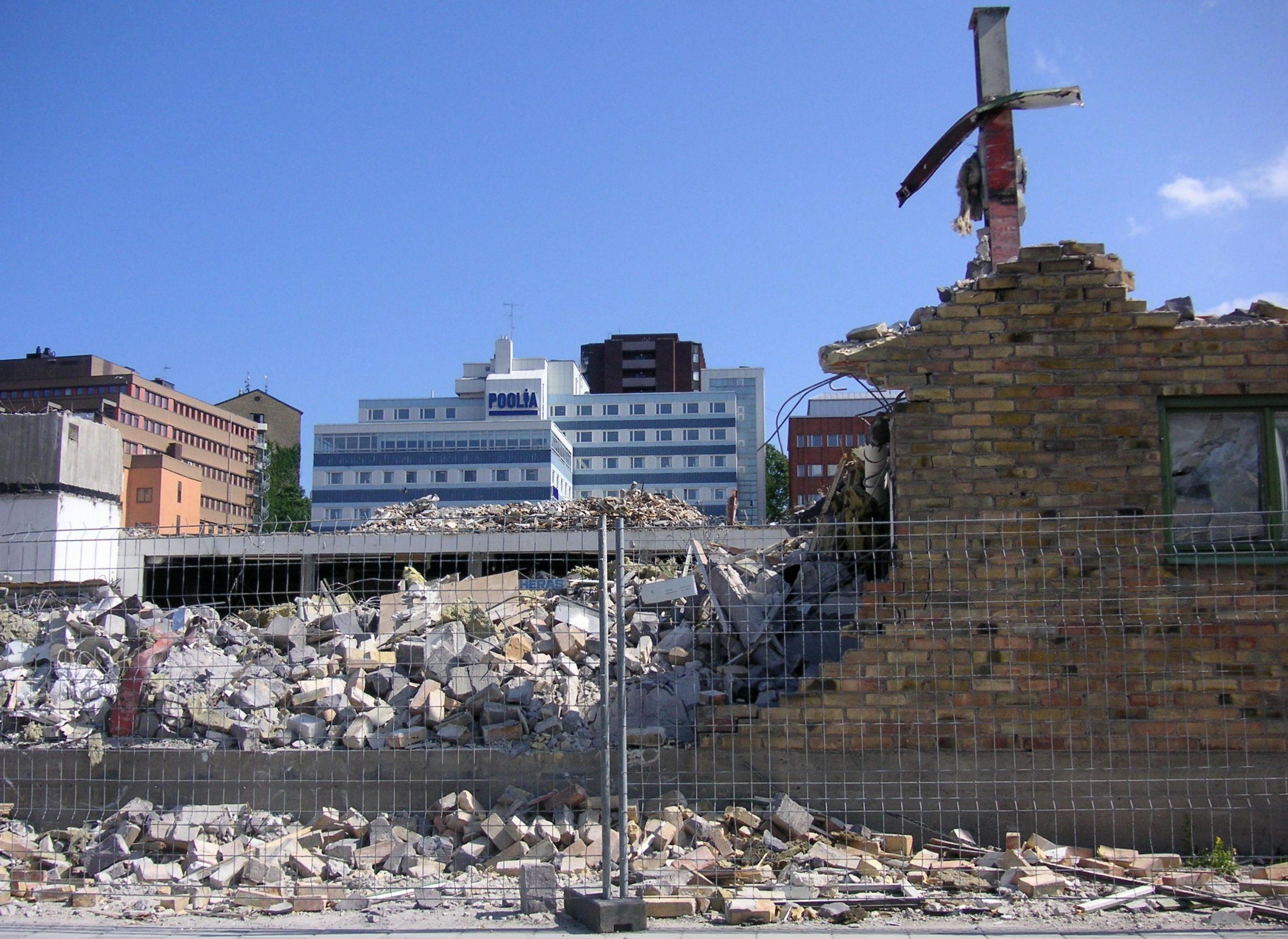 Rivningar för projekt Lindhagen, Kungsholmen, Stockholm